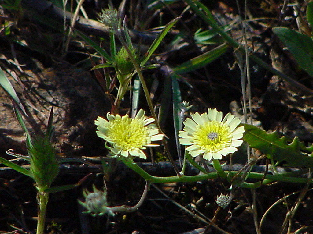 Œil du Christ (Tolpis barbata)